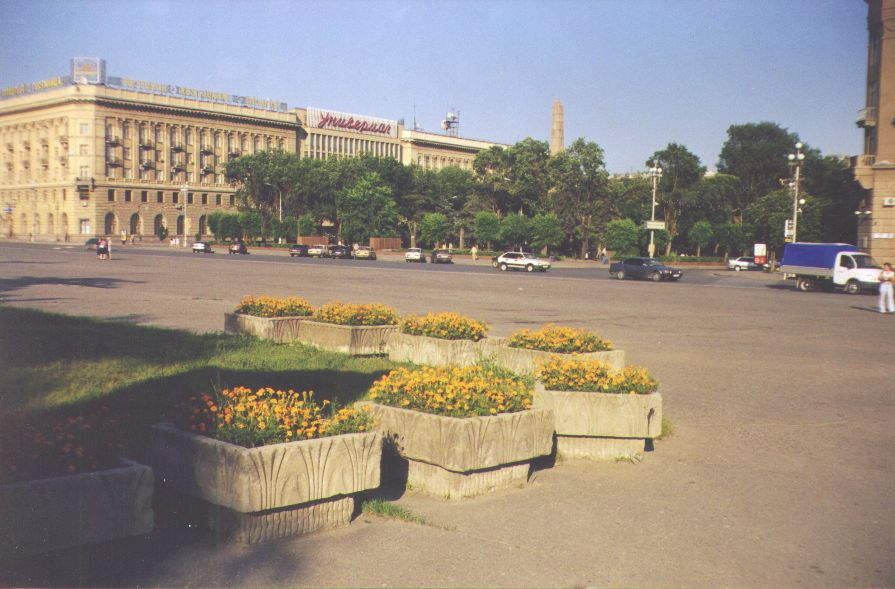 eo Placo en centro de urbo Volgograd (2003). ru Площадь в центре Волгограда (2003). La fonta bildo de cxi tiu bildo estas ankaux en mia propra retpagxaro [1] Mi, auxtoro de la bildo, permesas al cxiuj uzi gxin kun cxi tiuj kondicxoj